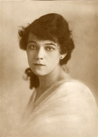 Molnár Ferenc: Úri divat; Társulat: Nemzeti Színház, Budapest; Bemutató: 1917.11.23; Rendező: Csathó Kálmán; Szereplők: Paula: Bajor Gizi; Felvétel ideje: 1917